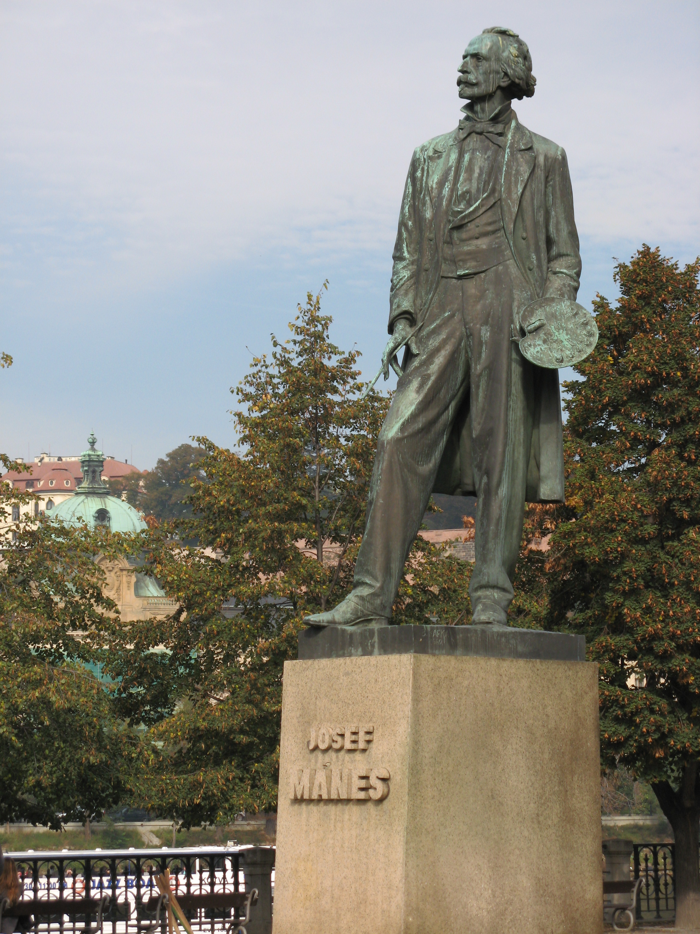 Statue von Josef Mánes in Prag